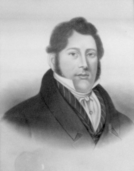 Allison Davie (1796-1836) « Né en 1796 en Écosse, Allison Davie est d’abord capitaine pour la Compagnie des Indes orientales, puis sur la route maritime de l’Atlantique avant d’arriver à Québec en 1825. Il rencontre alors Elizabeth Johnson Taylor, fille unique du constructeur de navires George Taylor. Plus tard la même année, il épouse Elizabeth en acceptant les deux conditions imposées par George Taylor, soit de devenir son associé et de perpétuer le nom de Taylor en plus de celui de Davie à travers ses enfants. Allison Davie décède accidentellement par noyade en 1836, seulement trois ans après l’ouverture du nouveau chantier à Pointe-Lévy. »